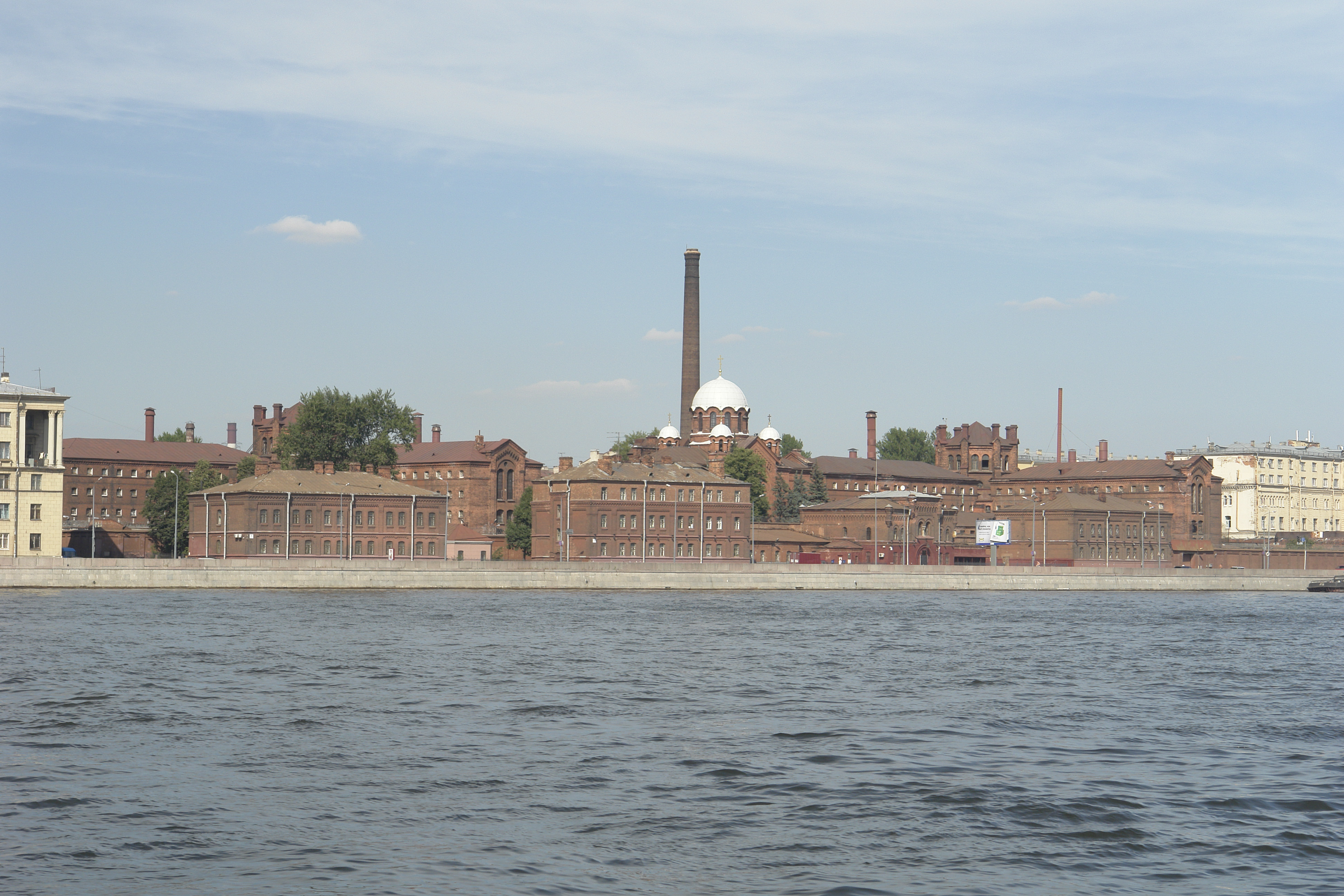 Тюрьма Кресты (вид с набережной Робеспьера, с плавучей пристани на углу с Чернышевского).